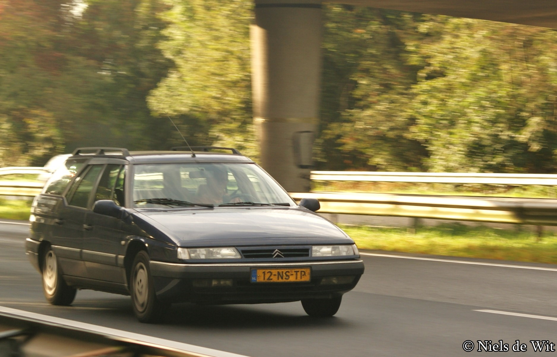 12-NS-TP